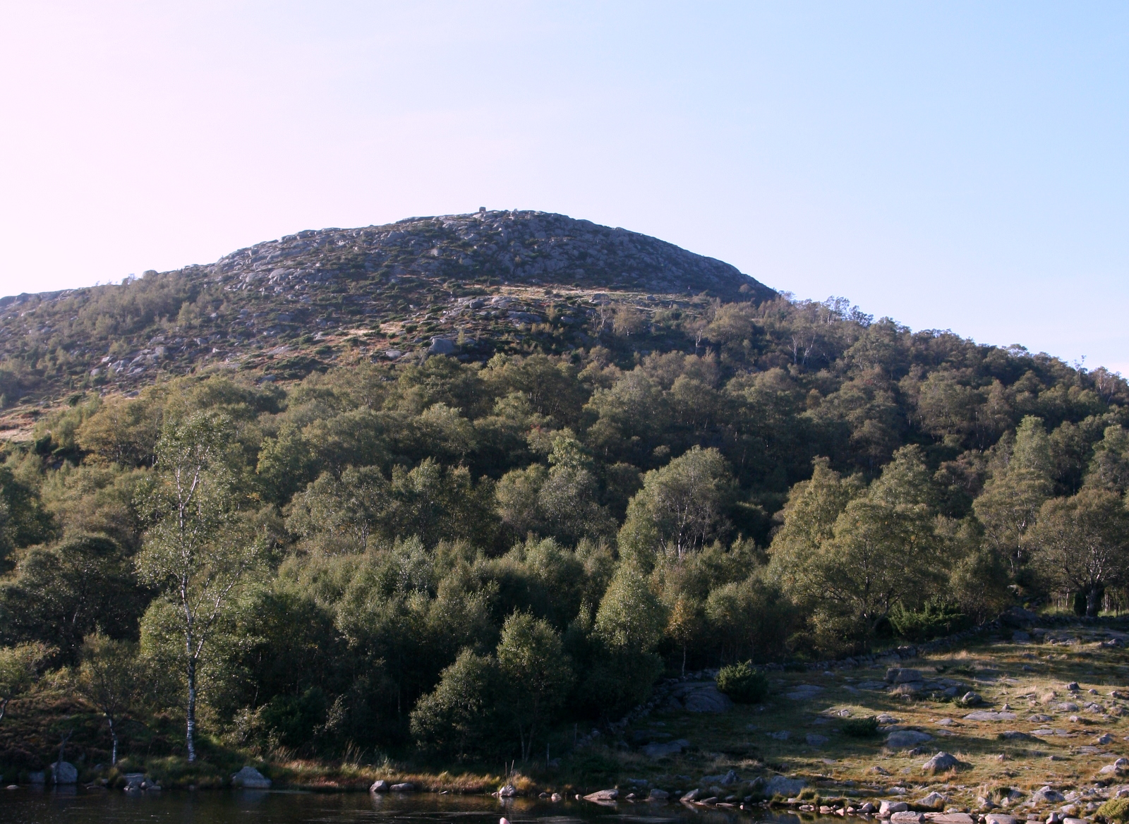 Dalsnuten. Bildet er tatt ved Revholstjørn